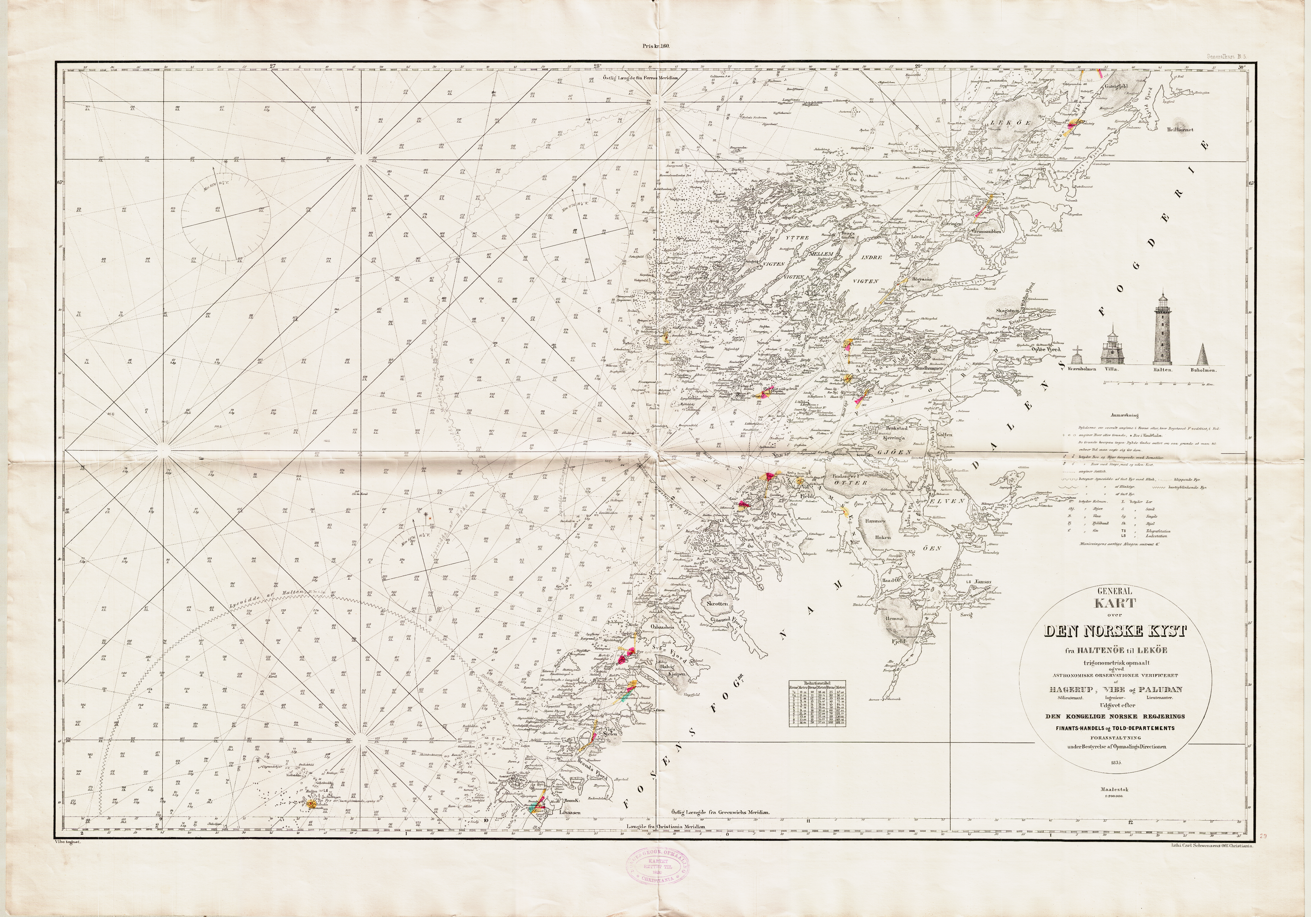 Sjøkart over kysten utenfor Trøndelag, fra Halten til Leka, fra 1835. Tegnet av Vibe i målestokk 1:200 000. Original kartstørrelse ca 97 cm x 68 cm. Et eksemplar befinner seg hos Statens kartverk Sjø i Stavanger.